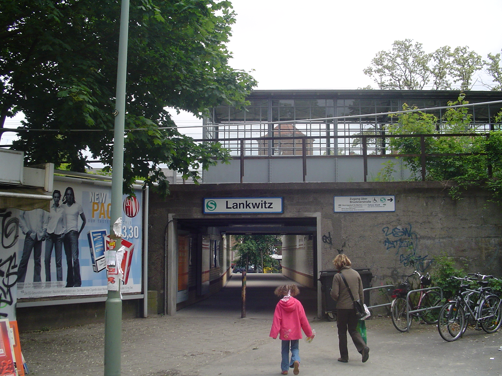 S-Bahnhof Lankwitz von Norden aus gesehen